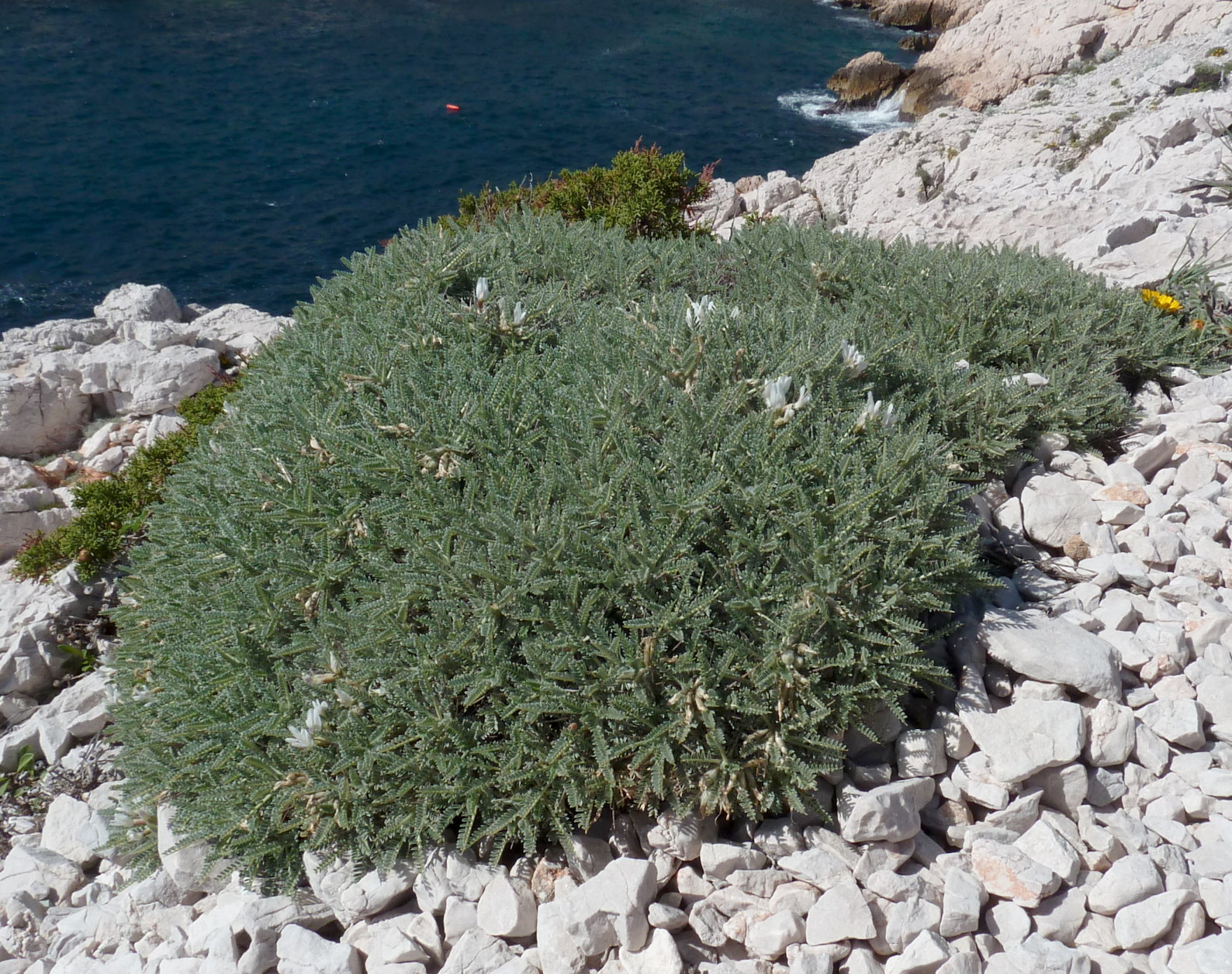 Astragalus tragacantha à Callelongue (Marseille, France)